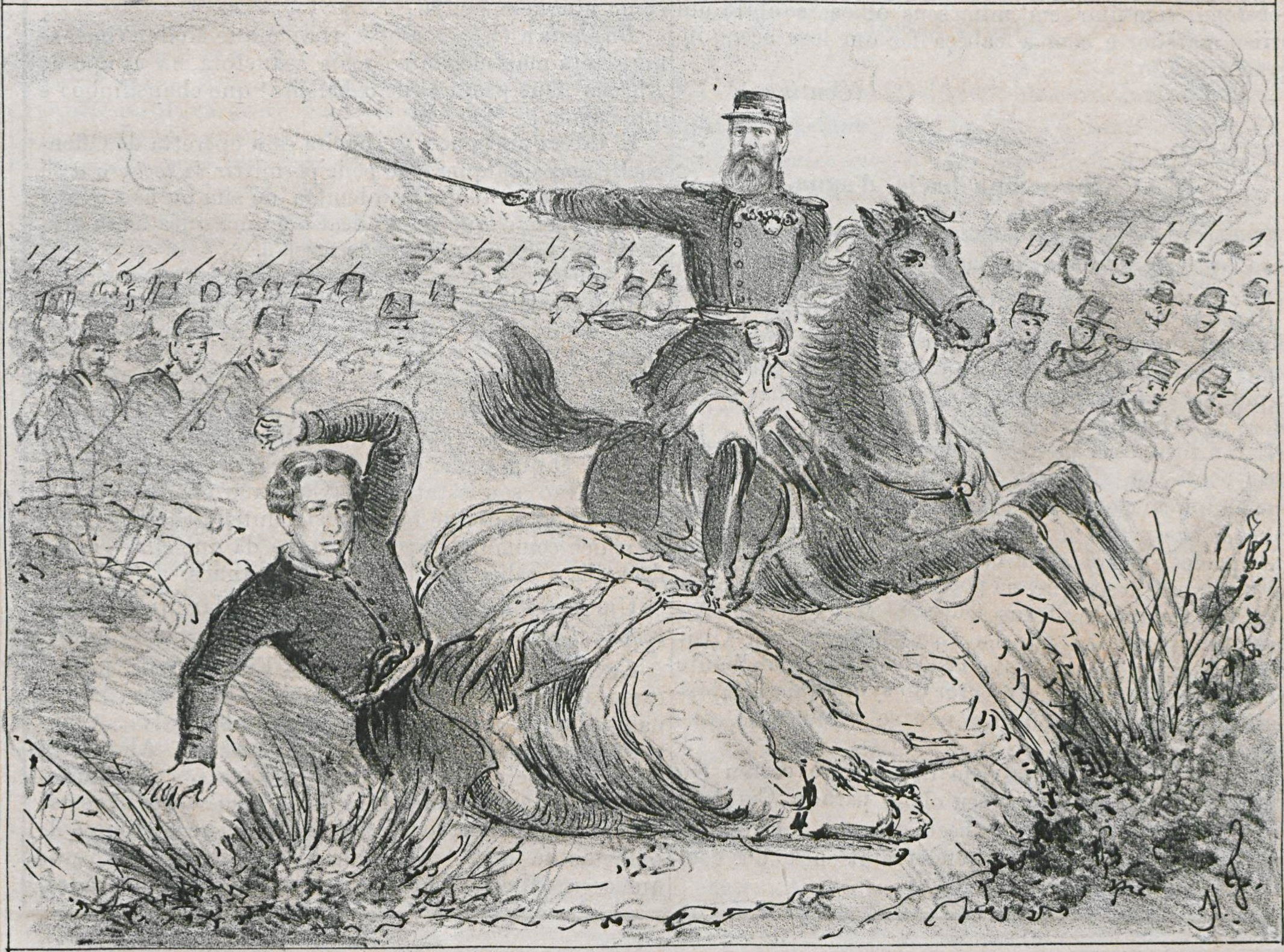 O tenente-coronel Salustiano Jeronymo dos Reys da 14ª brigada na batalha de Tuyuty, vê cair o filho, alferes Salustiano Jeronymo Fernandes Reys, moço de 17 anos, ferido por um foguete a congréve. O pai recebe moralmente o golpe, mas o soldado sufocou o pai. O coronel da ordem de avançar, e a frente dos seus bravos mostra quanto pode a consciência do dever.